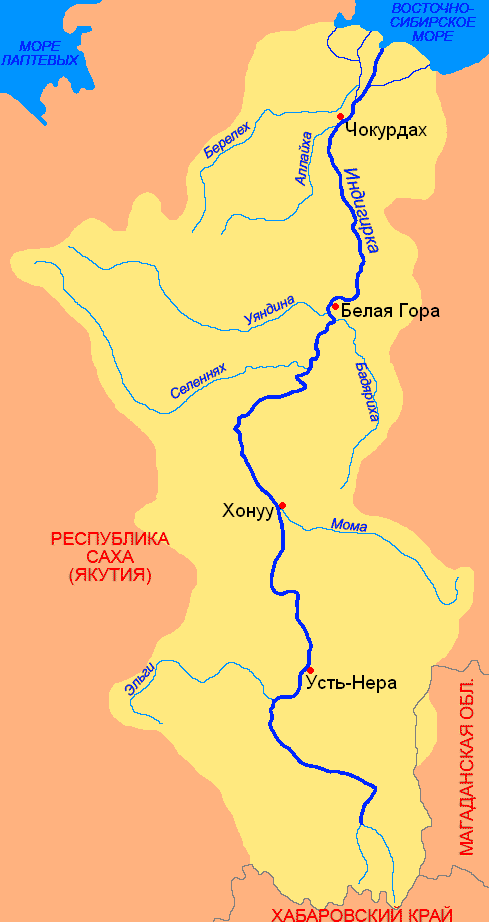 Схема бассейна реки Индигирка